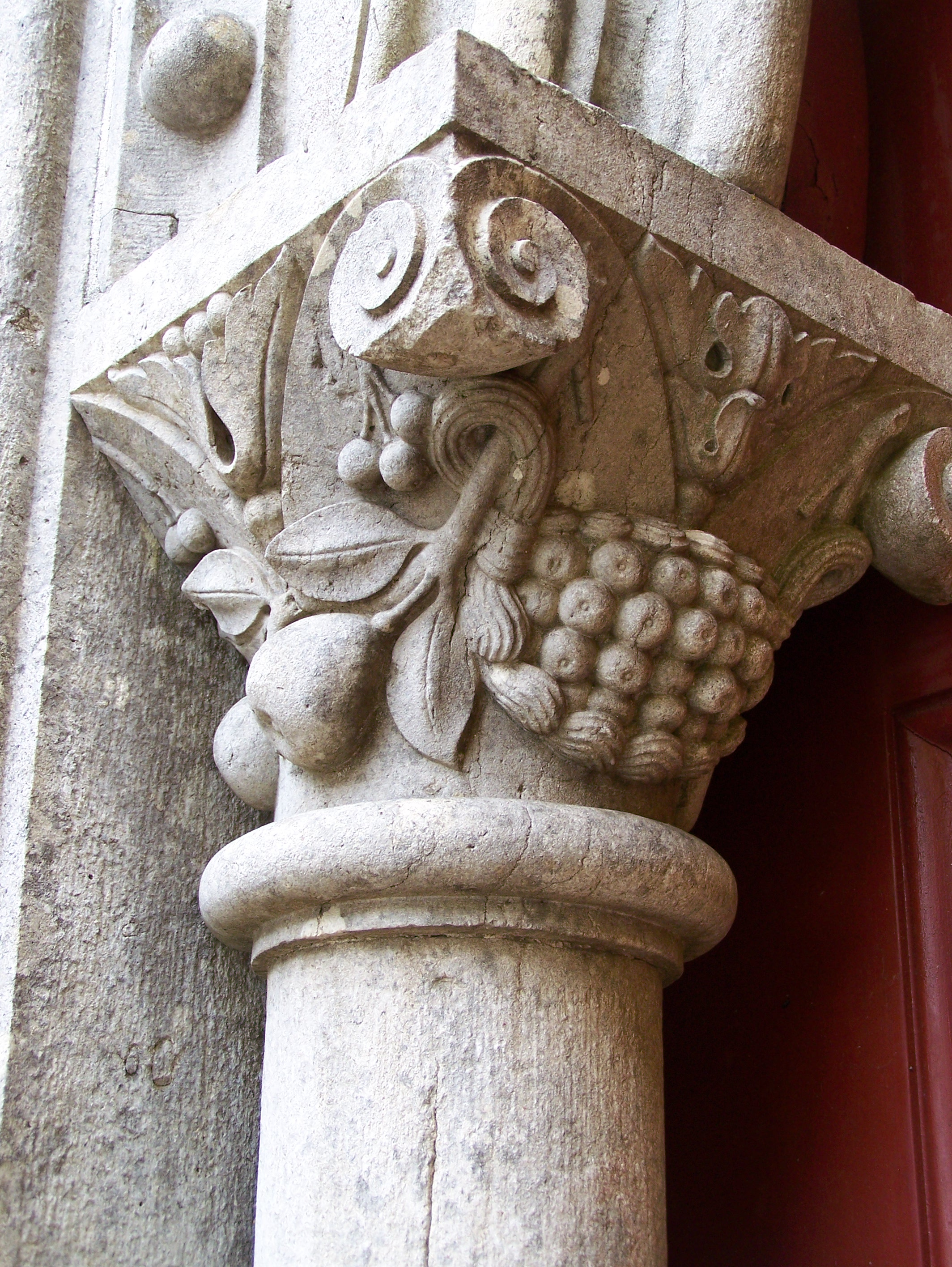 Palácio Nacional da Pena, Sintra, Portugal.